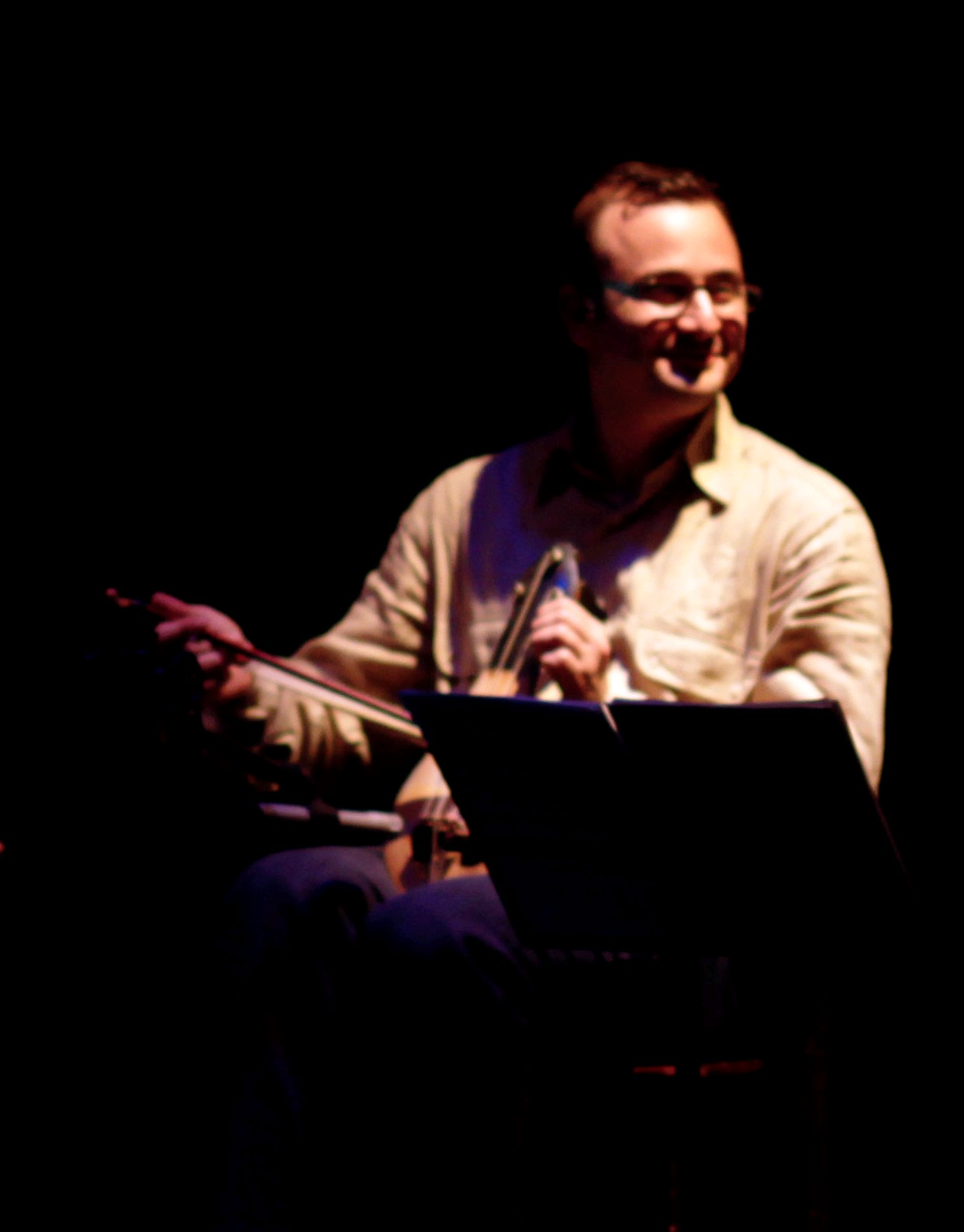 İncesaz konserinde Derya Türkan